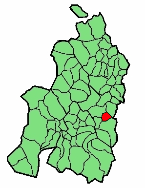 aipaturiko udalerriaren kokapena Nafarroa Beherean